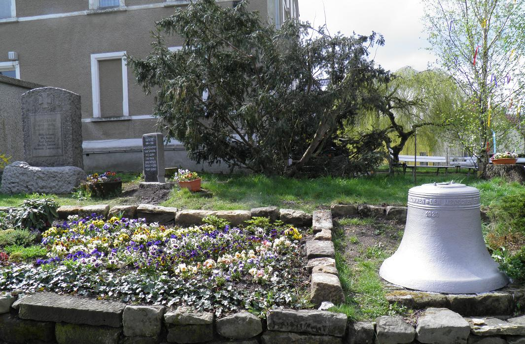 Kriegerdenkmal Erster und Zweiter Weltkrieg sowie Glocke aus Tharandt in Grillenburg